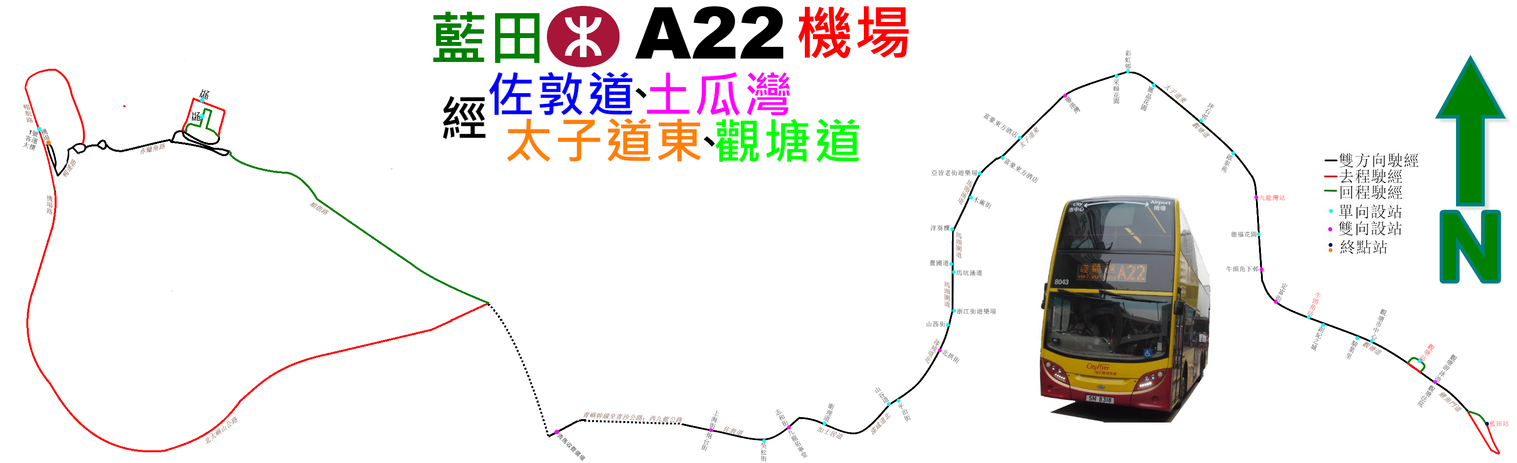 中文（香港）: 城巴A22線的走線圖